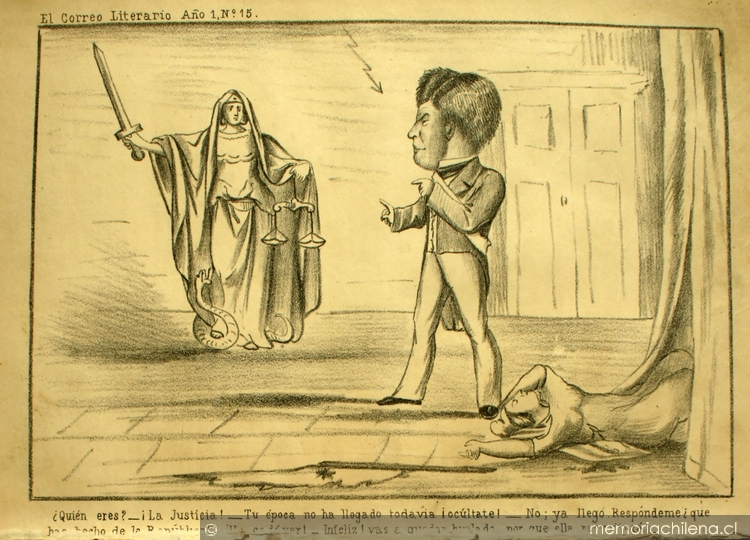 caricatura por antonio smith